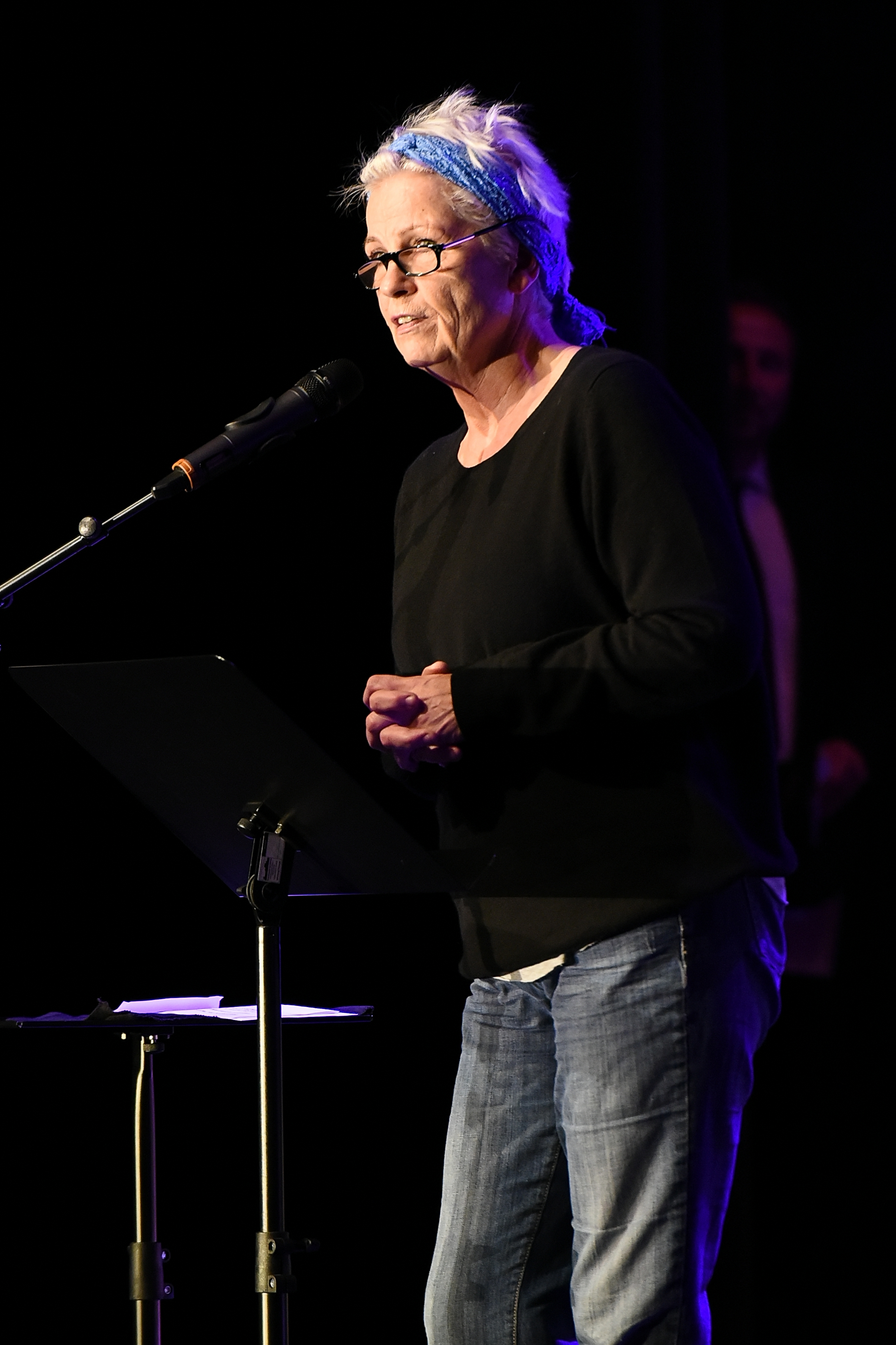 Gerburg Jahnke als Laudatorin bei Tegtmeiers Erben 2015 im Kulturzentrum Herne.